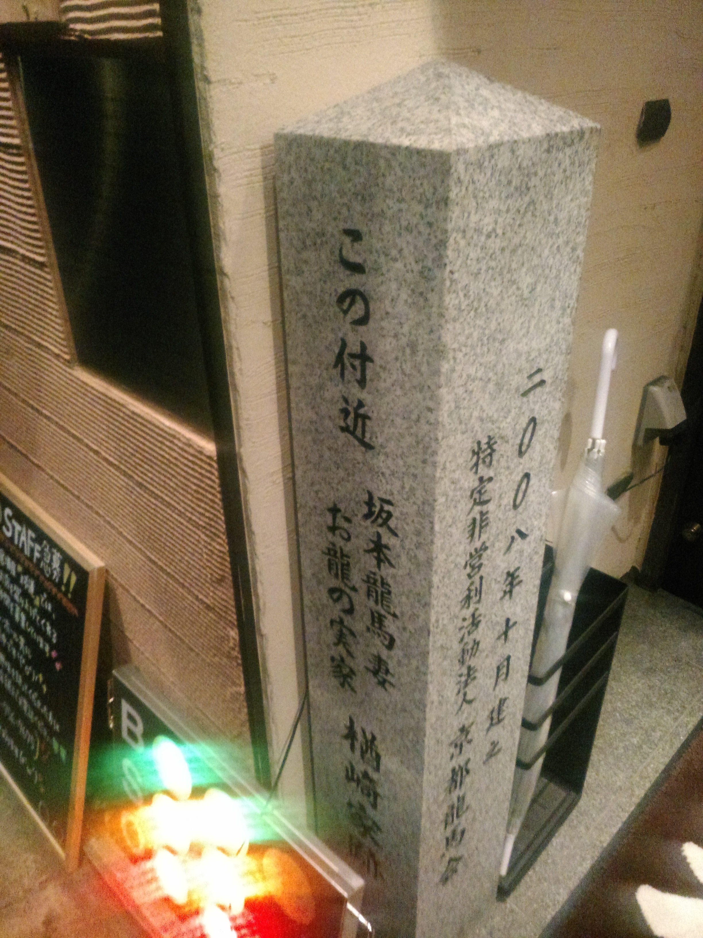 お龍の実家 楢崎家跡石碑